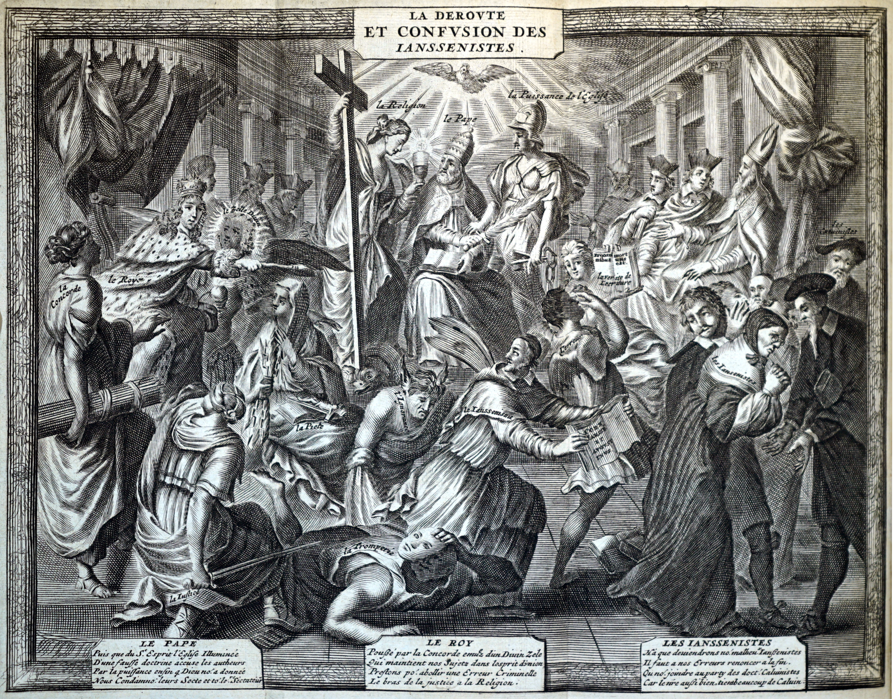 Les Enlumineuses du fameux almanach des Jésuites intitulé: "La Déroute et la Confusion des jansénites ou triomphe de Molina, jésuite, sur St Augustin" [par J.-L. Le Maistre de Saci. Avec "L'Onguant pour la brûlure, ou le secret d'empescher aux Jésuites de bruler des livres. [par J. Barbier d'Aucour